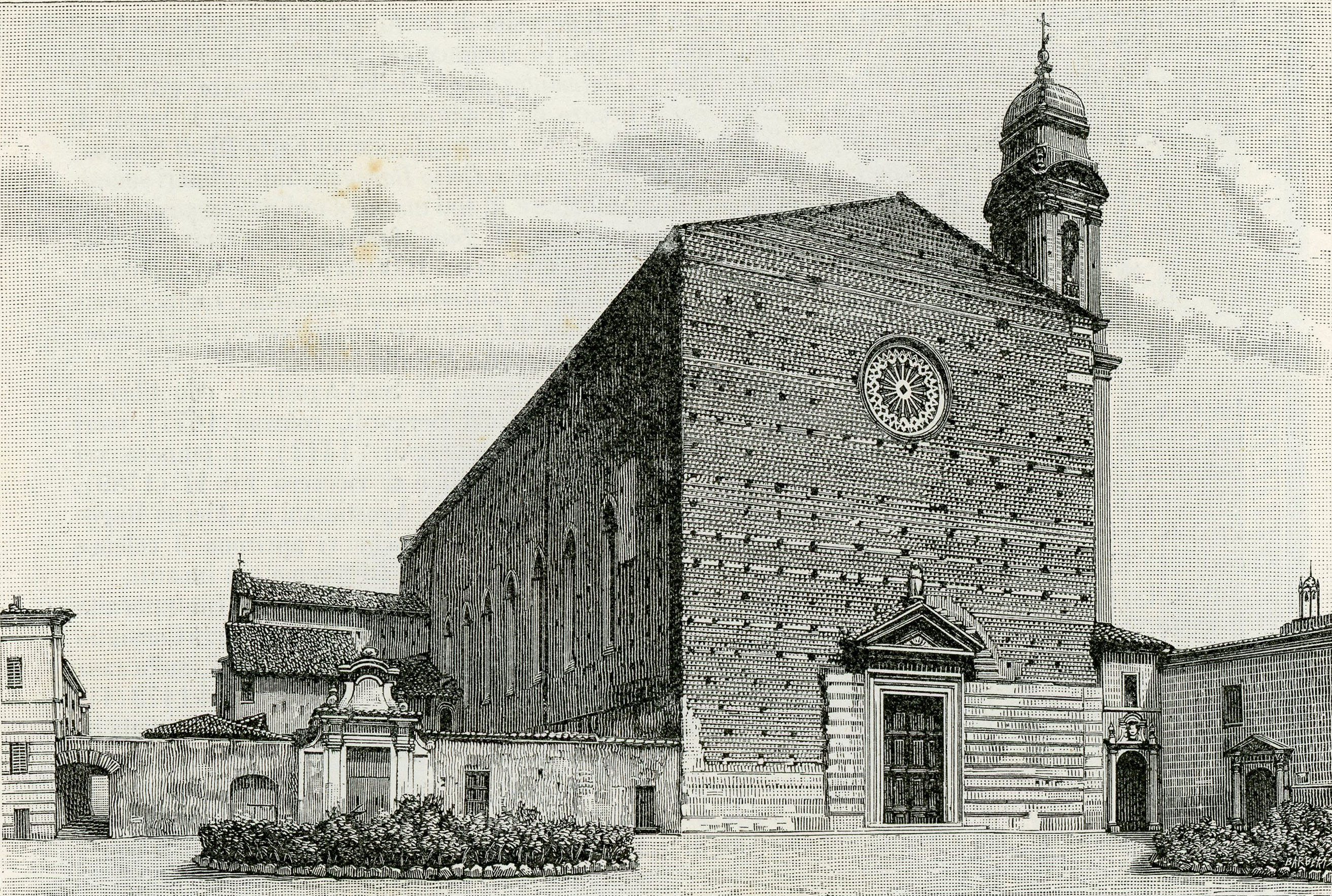 Siena: Chiesa di San Francesco (xilografia di Giuseppe Barberis).